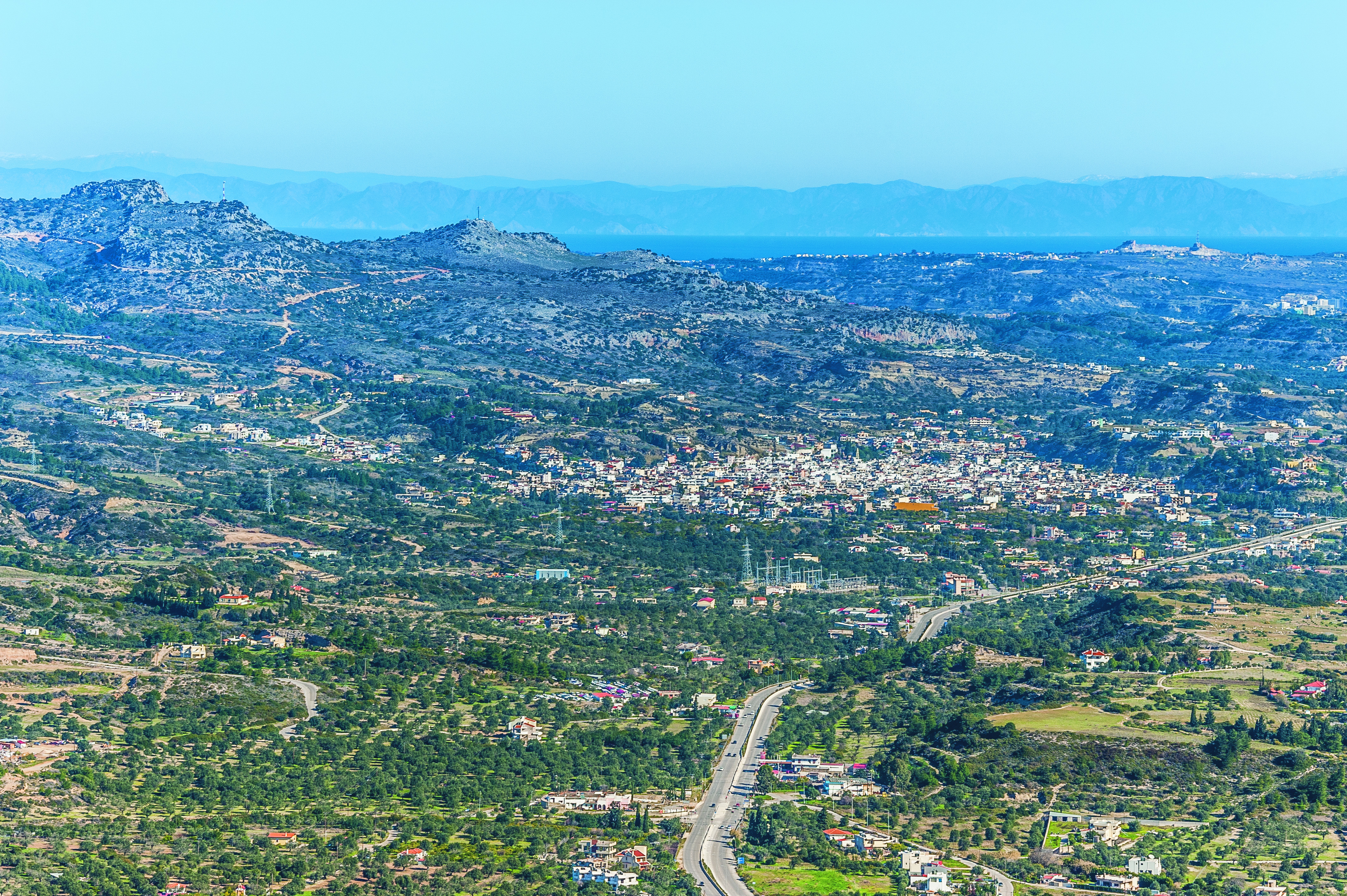 Το χωριό Αφάντου στους πρόποδες του λόφου Ψαλίδι.